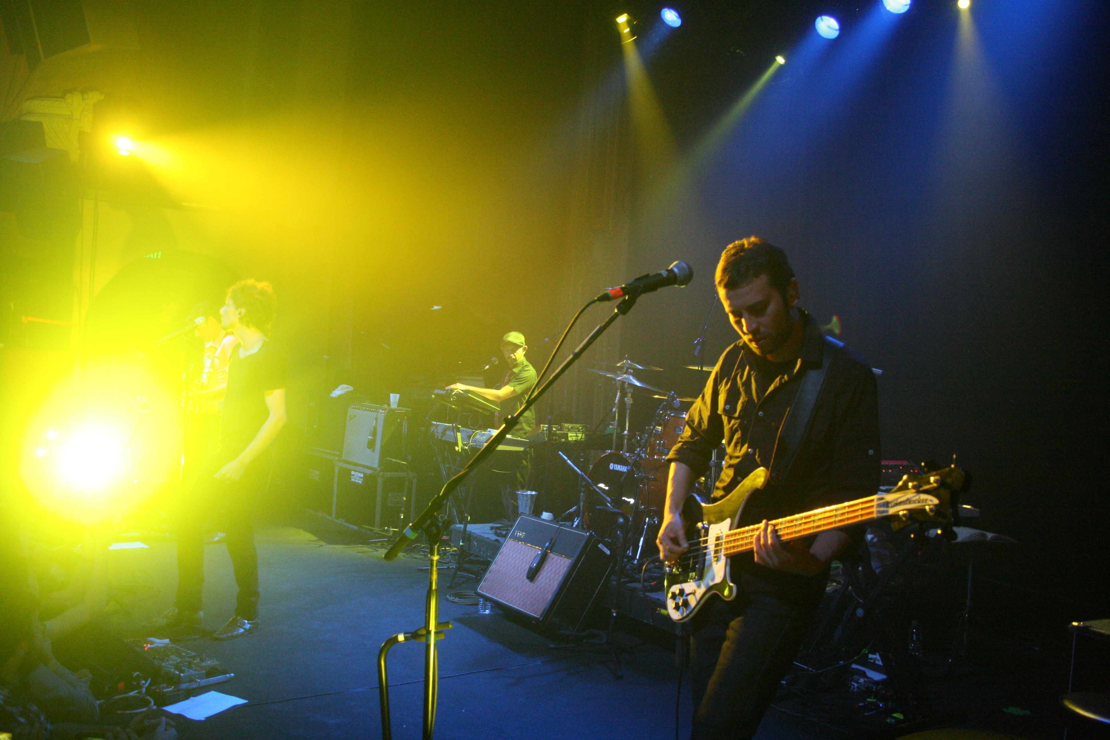 Zoé